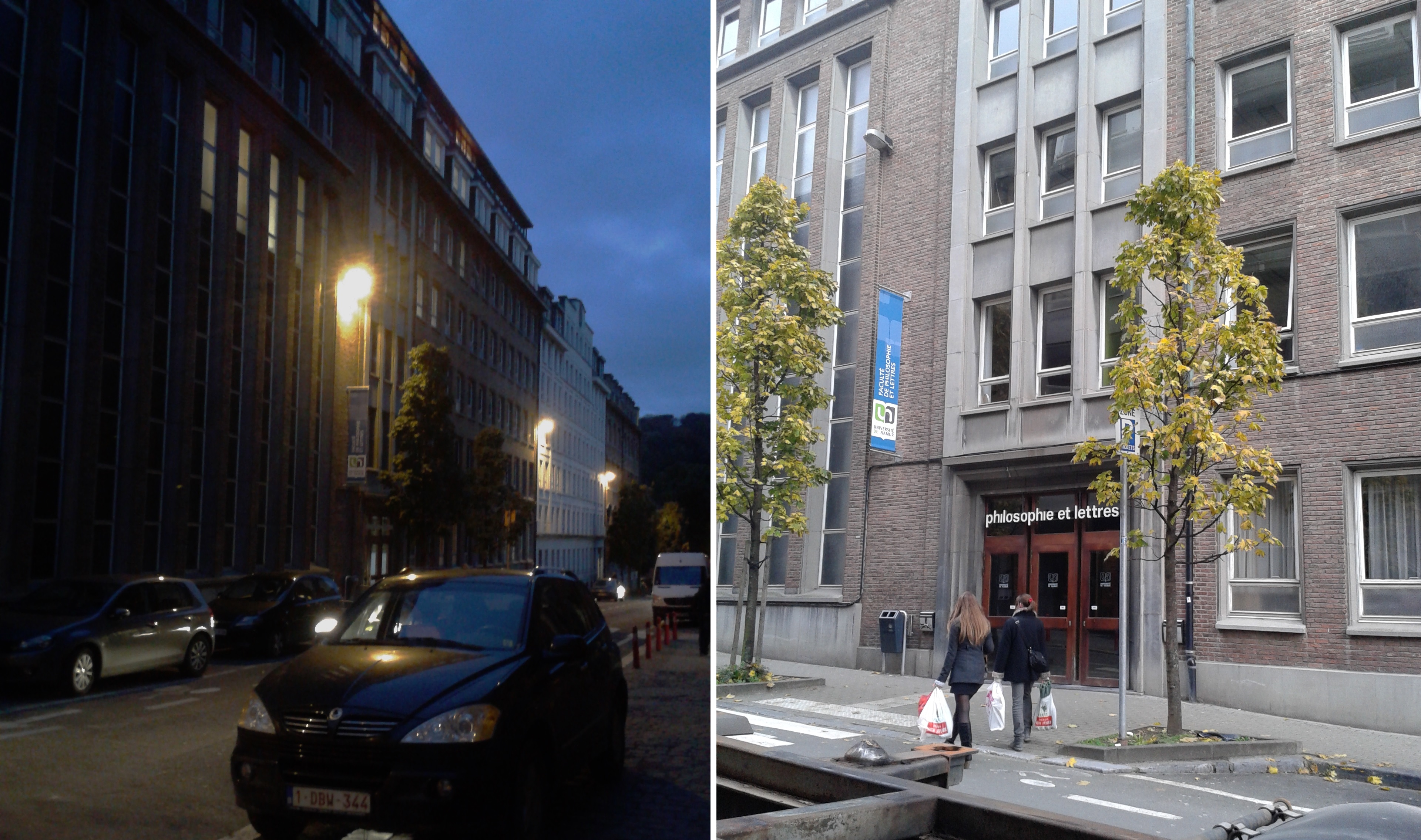 Vue nocturne et diurne de la façade d'entrée de la faculté de philosophie et lettres de l'UNamur